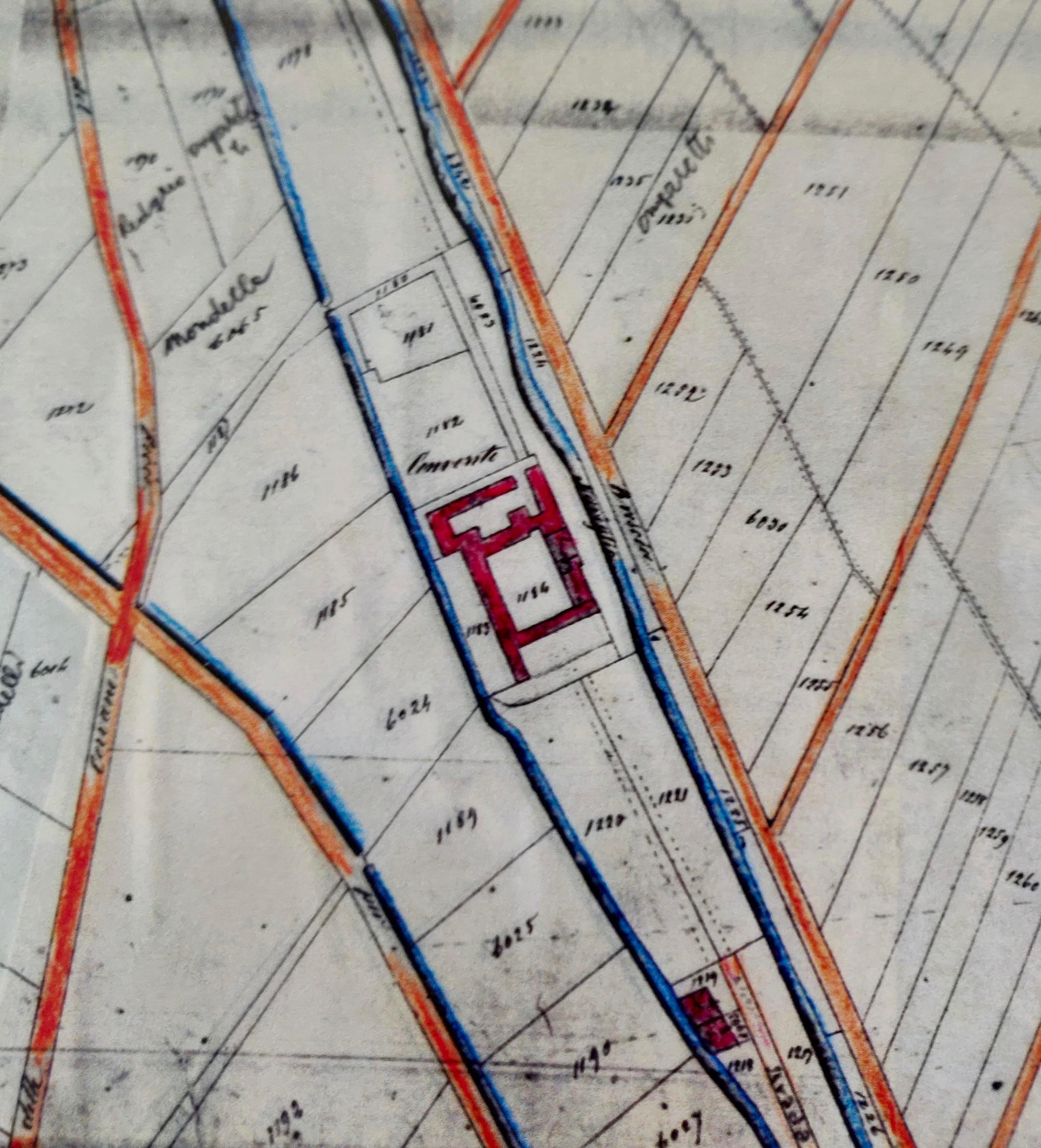 Il rilievo del convento nel catasto austriaco, realizzato nel 1852, evidenzia ancora una complessa situazione planimetrica della struttura religiosa